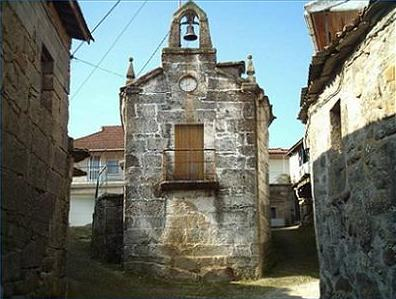 Catedral de Veiga Das meas